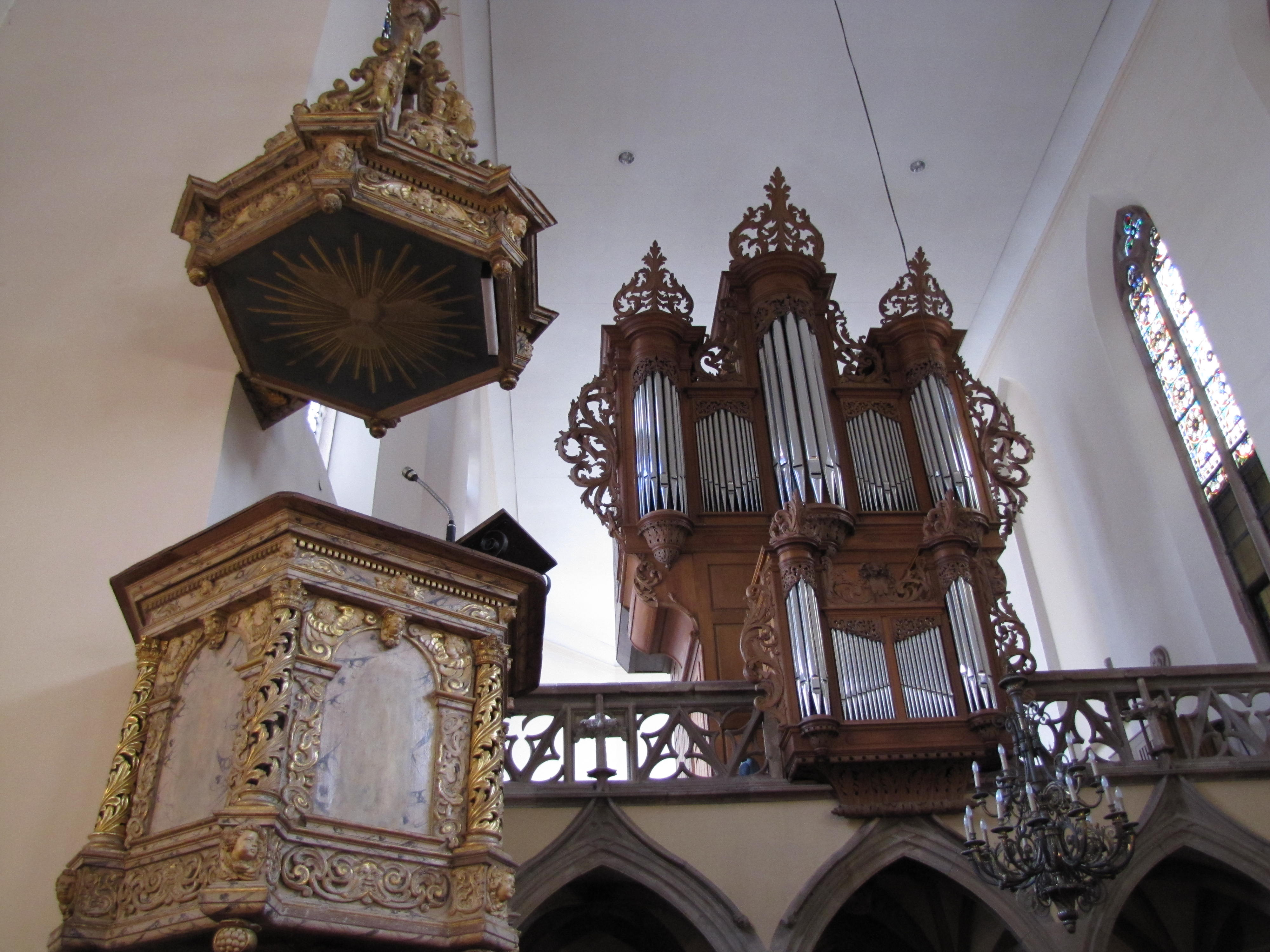 Alsace, Bas-Rhin, Église protestante Saint-Guillaume de Strasbourg (PA00085026). Chaire à prêcher (1656): Orgue André Silbermann (1728): This object is classé Monument Historique in the base Palissy, database of the French furniture patrimony of the French ministry of culture, under the references orgue PM67000973 orgue and buffet PM67000404 buffet.